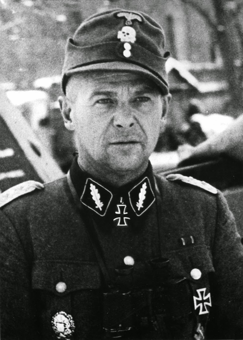 Veiss con una Cruz de Caballero y una Cruz de Hierro de 1a clase y una medalla de herido en plata.